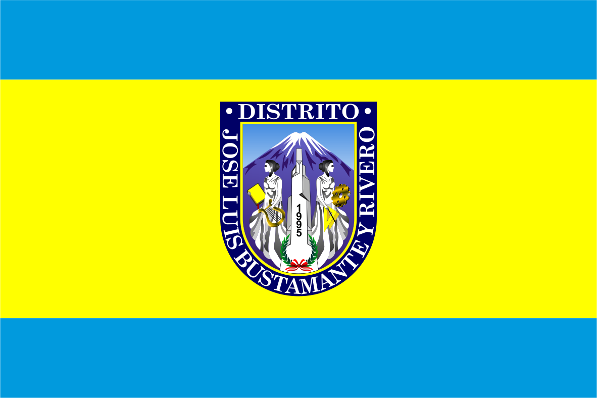 Distrito de José Luis Bustamente